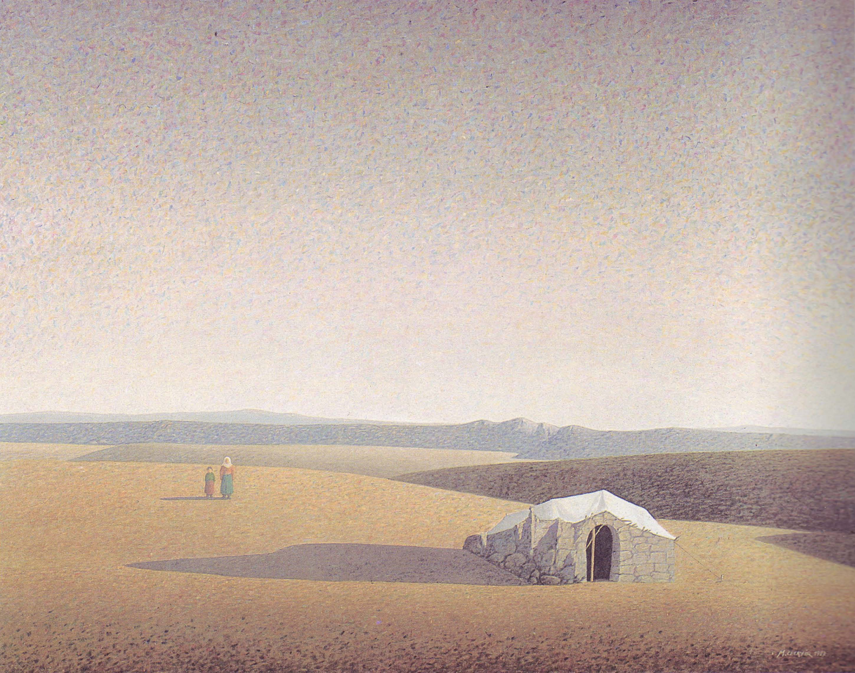 Mahmut Celayir: Die Große Einsamkeit der Alamanci Frau I, Öl auf Leinwand, 85 x 110 cm, 1984.Eine Alamanci ist eine Frau, die mit ihren Kindern allein lebt, weil ihr Mann in Deutschland arbeitet.